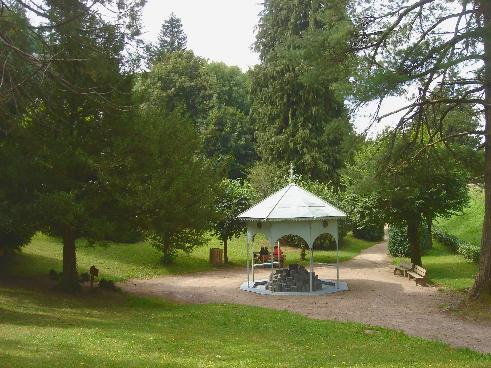 Kiosque ou buvette de la source d'eau minérale